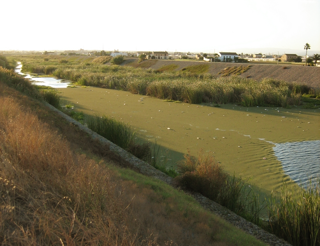 Foto del Barranc del Carraixet a su paso por Alboraya.